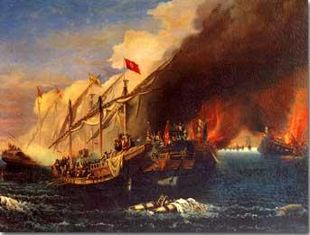 Barbarossa Hayreddin Pasha defeats the Holy League of Charles V under the command of Andrea Doria at the Battle of Preveza (1538) Turkish Naval Museum, Istanbul.